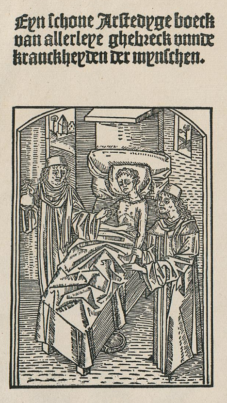 Titelblatt